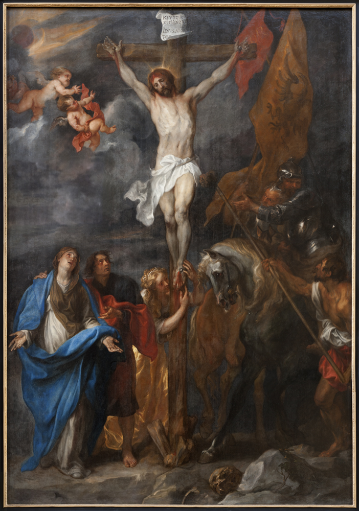 Christus aan het kruis van Antoon van Dyck, 1628-1630